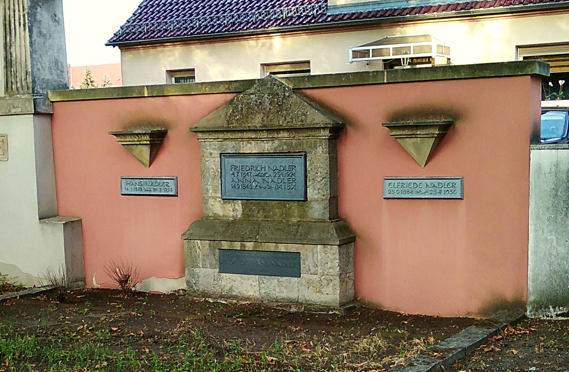 Familiengrab der Familie Nadler im Stadtpark Elsterwerda